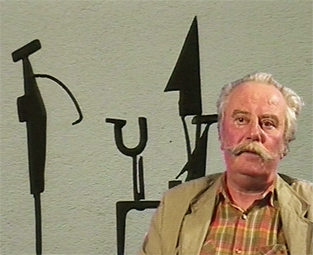 Portrait de Henri Larriere